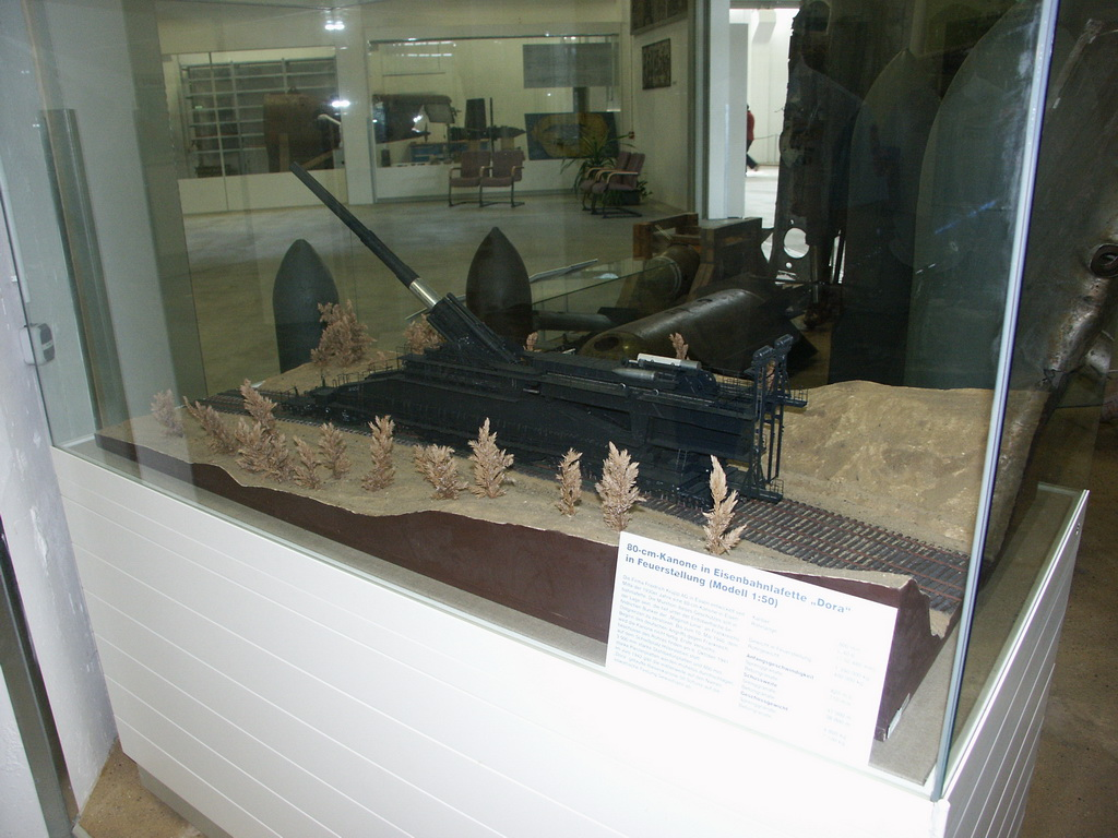 Bundeswehrmuseum Dresden mit Teilen von der NVA Dora Geschütz